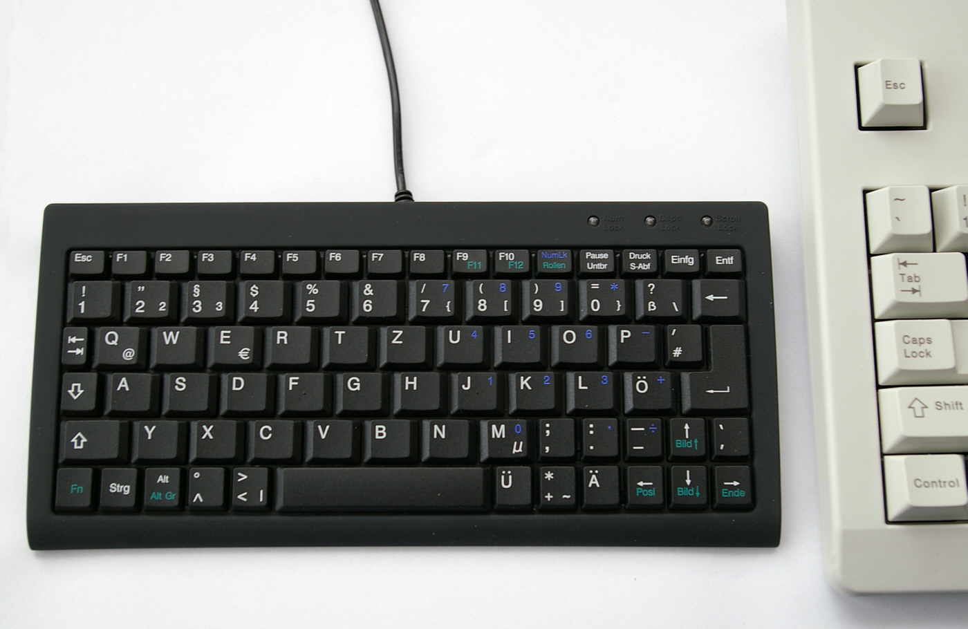 PC-Kompatible Miniaturtastatur, gedacht für den mobilen Einsatz/Service etc. Rechts eine Tastatur in üblicher Größe